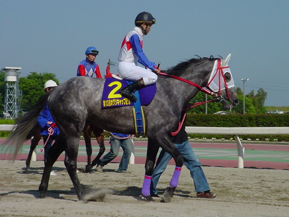 平成16年(2004年)笠松競馬場にて。オグリキャップ記念出走。鞍上 東川公則騎手。